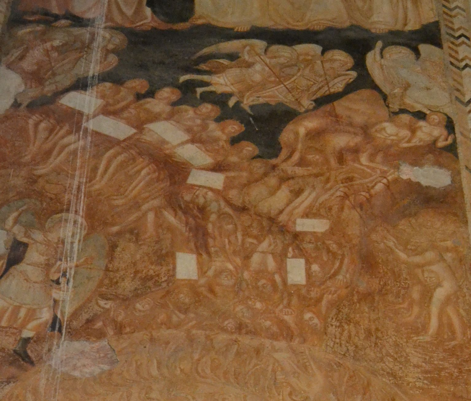 Chiesa di Santa Maria DonnareginaVecchia - Coro delle monache Particolare del ciclo Inferno